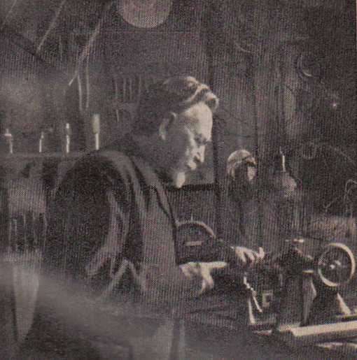 Husflidsmanden og læreren Niels Christian Rom (N. C. Rom) (1839-1919) ved drejebænk. Se flg. biografier